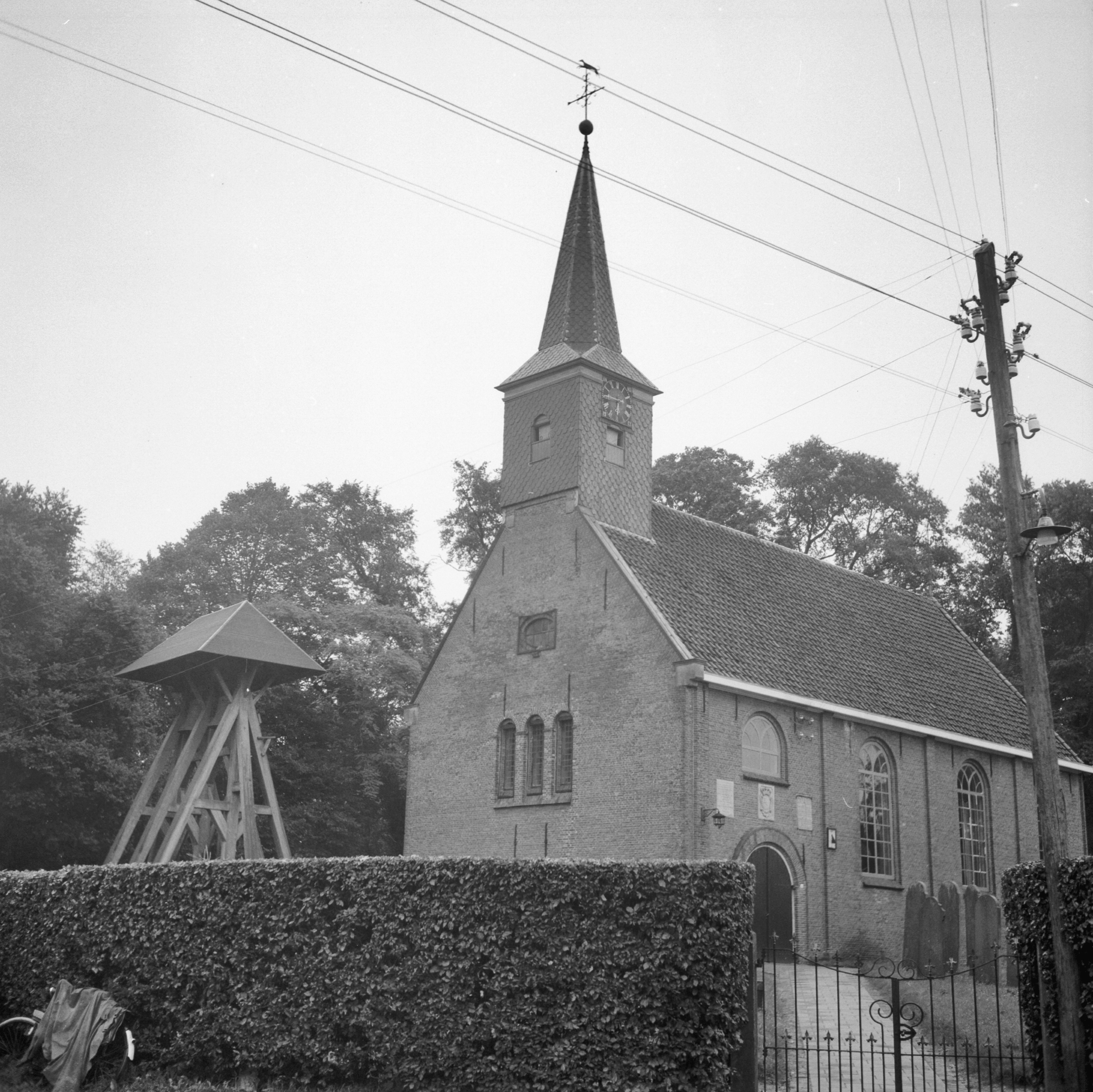 Kerk: kerk en klokkestoel